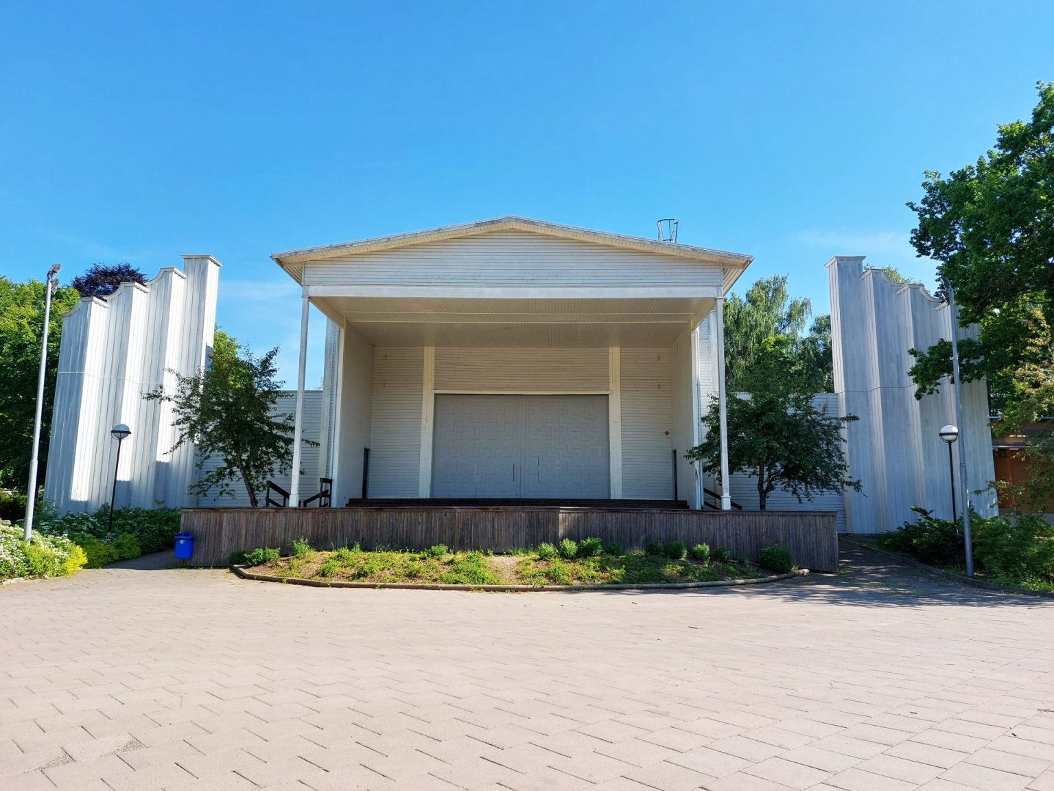 Parkteatern, Adolfsberg, Sweden